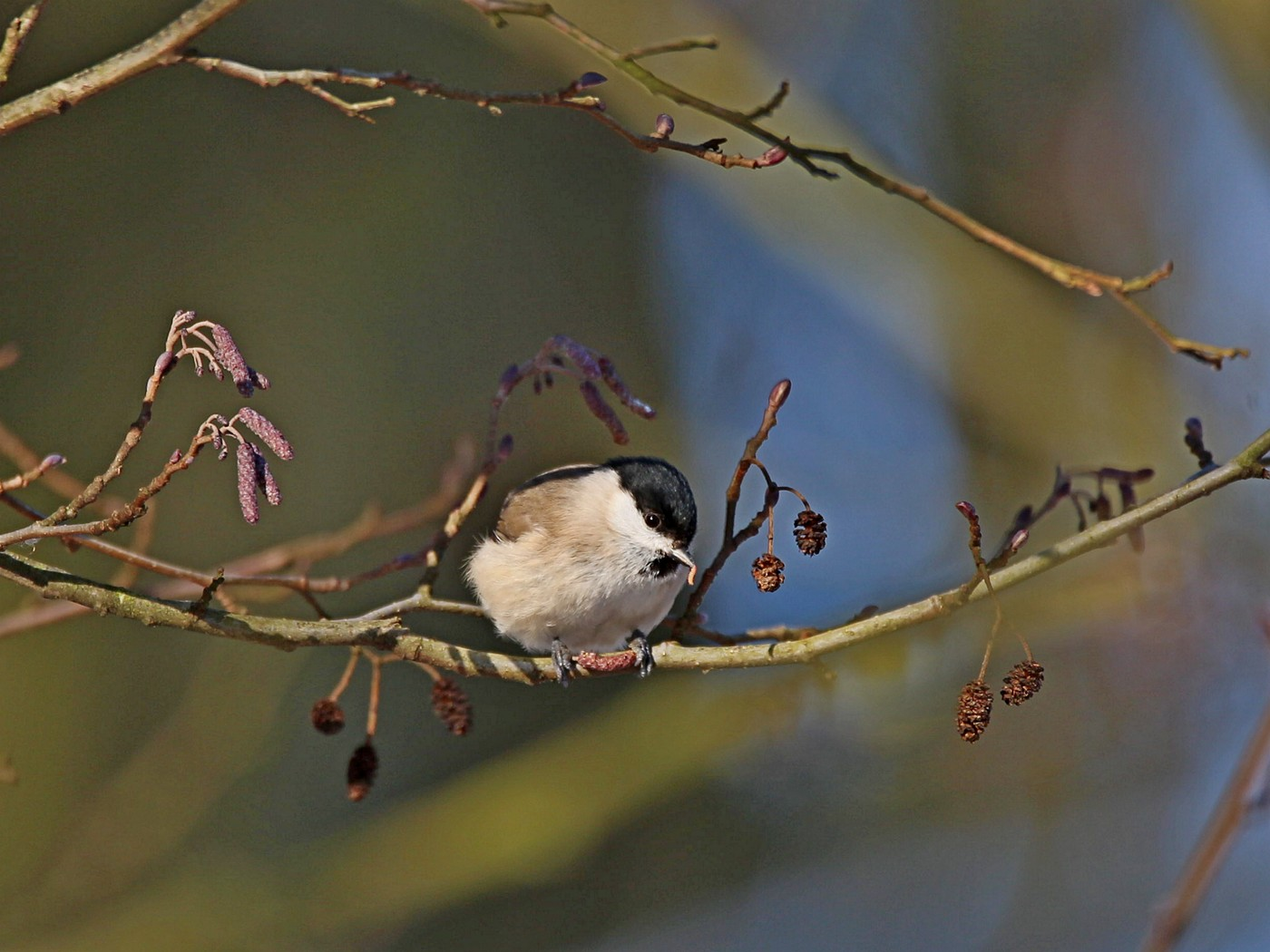 Kohlmeise mit Beute auf Erlenast in Kieve